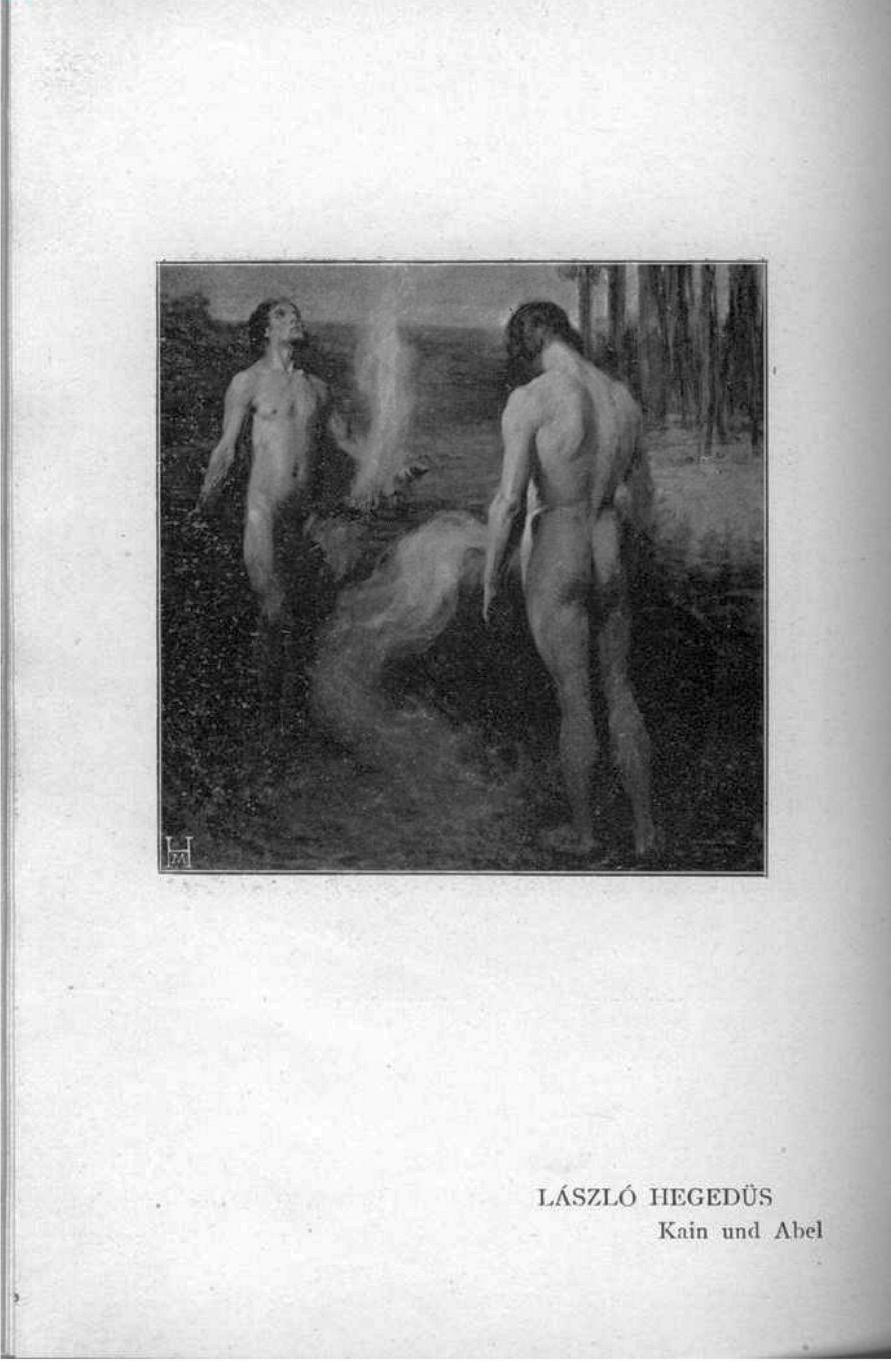 Kain und Abel